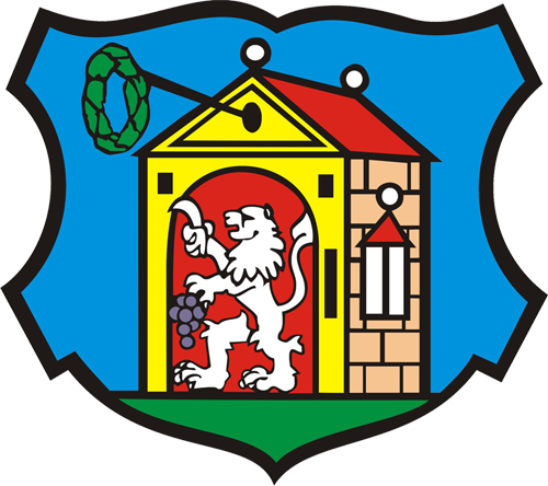 Znak obce Strážnice (okres Hodonín).